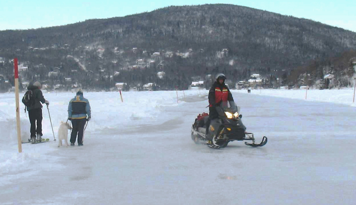 Motoneige sur la patinoire publique et lieu de promenade sur le lac Beauport, Municipalité de Lac-Beauport, près de Québec (Québec, Canada). Note : la motoneige est en infraction selon la Loi provinciale québécoise. « Un motoneigiste ne peut utiliser une piste réservée exclusivement à l'usage d'un autre sport, tel le ski de randonnée, le ski alpin et la raquette, sauf en cas d'accident ou d'urgence;» (Gouvernement du Québec. Règlement sur la motoneige. R.R.Q., 1981, c. C-24, r. 21, a. 72; D. 1646-85, a. 1). «La circulation des véhicules hors route à une distance inférieure à celle fixée par règlement municipal ou, à défaut, à moins de 30 m d'une habitation, d'une installation exploitée par un établissement de santé ou d'une aire réservée à la pratique d'activités culturelles, éducatives, récréatives ou sportives est interdite.» (Lois refondues du Québec, chapitre V-1.2. Loi sur les véhicules hors route. 1996, c. 60, a. 12; 2000, c. 56, a. 209; 2002, c. 68, a. 52; 2010, c. 10, a. 150; 2010, c. 33, a. 3.)